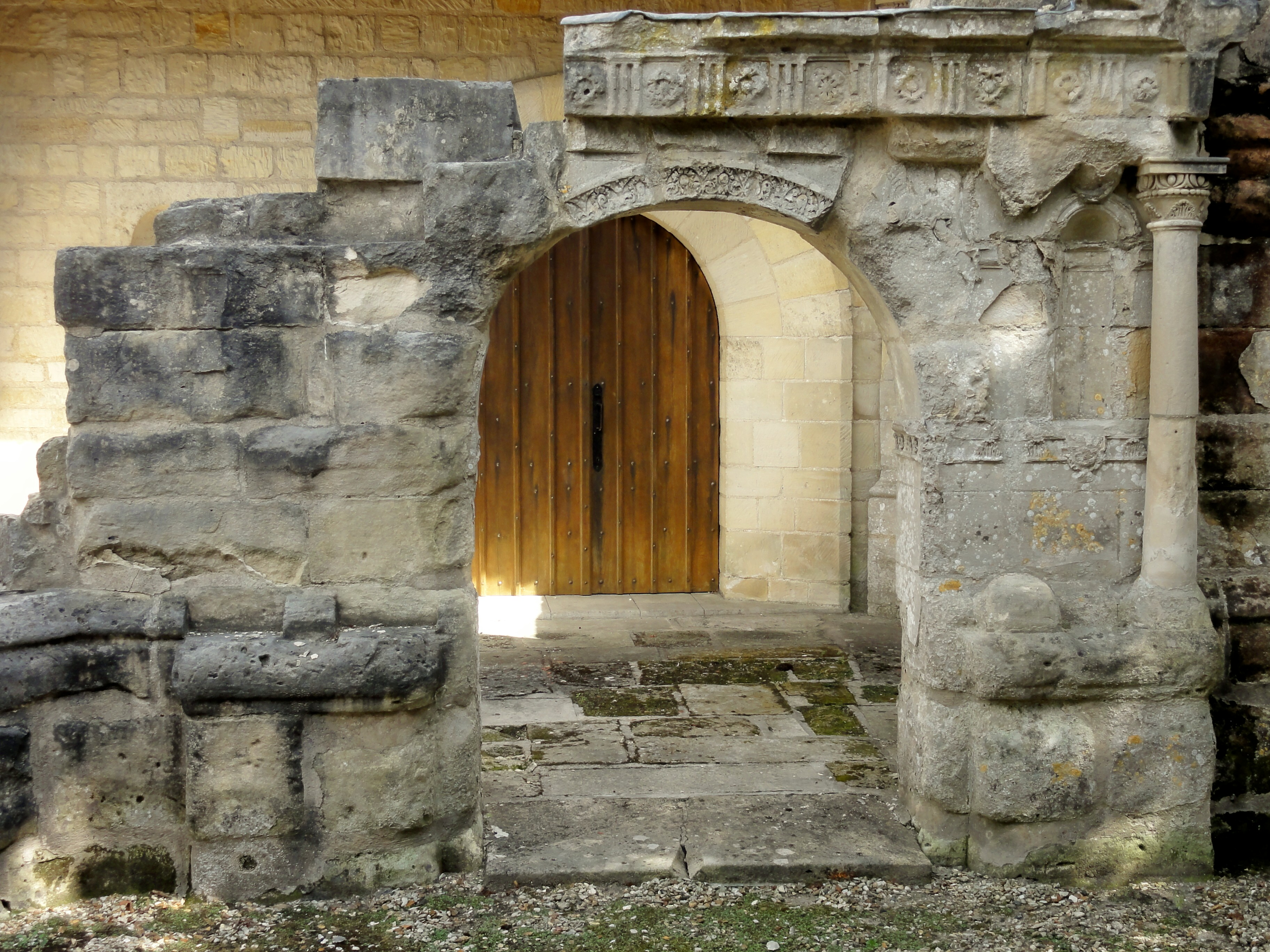 Vestiges du portail Renaissance de l'ancienne église.